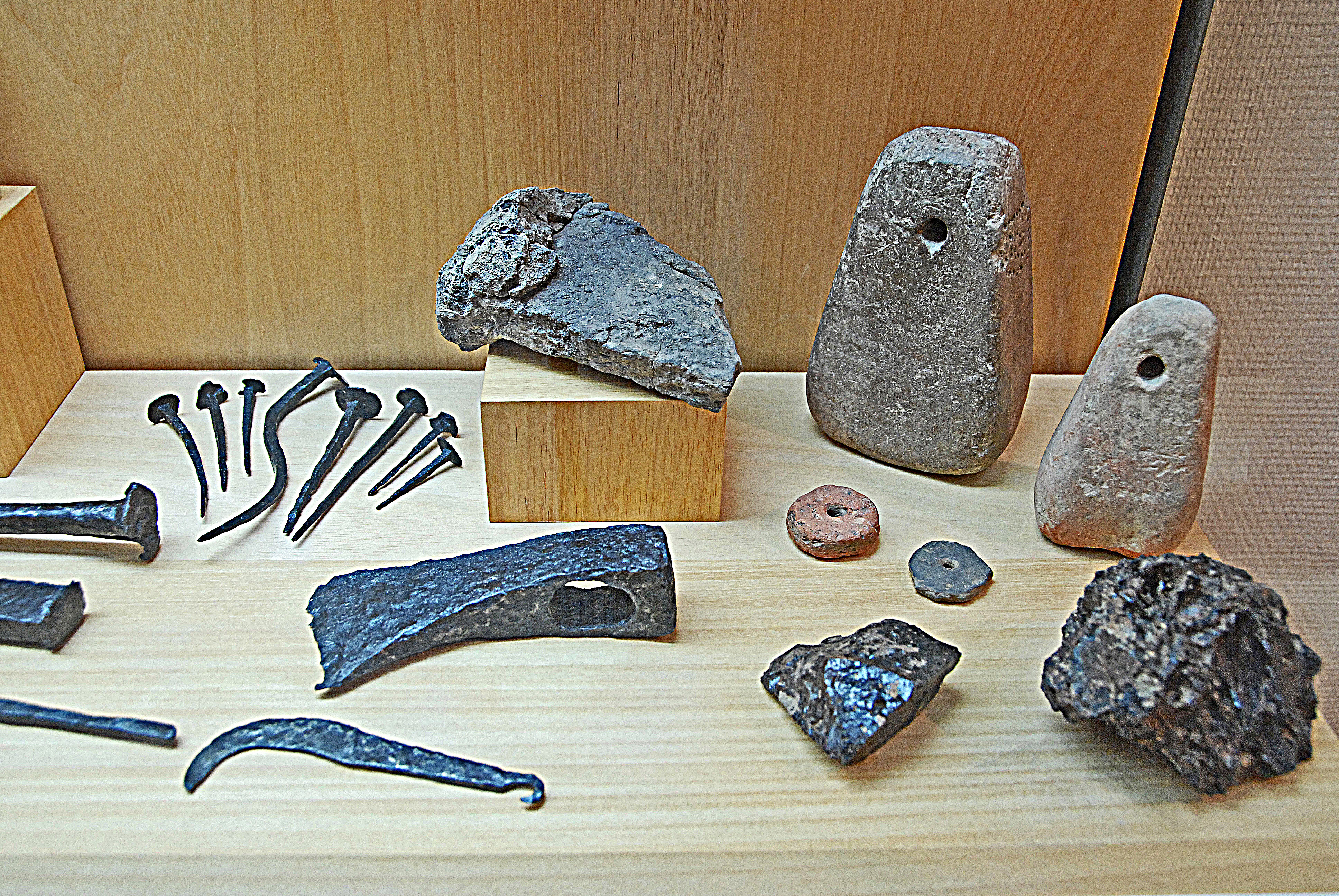 Civaux, Museum, Stein- und Eisengeräte